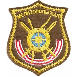 8-я ракетная Мелитопольская Краснознамённая дивизия РВСН